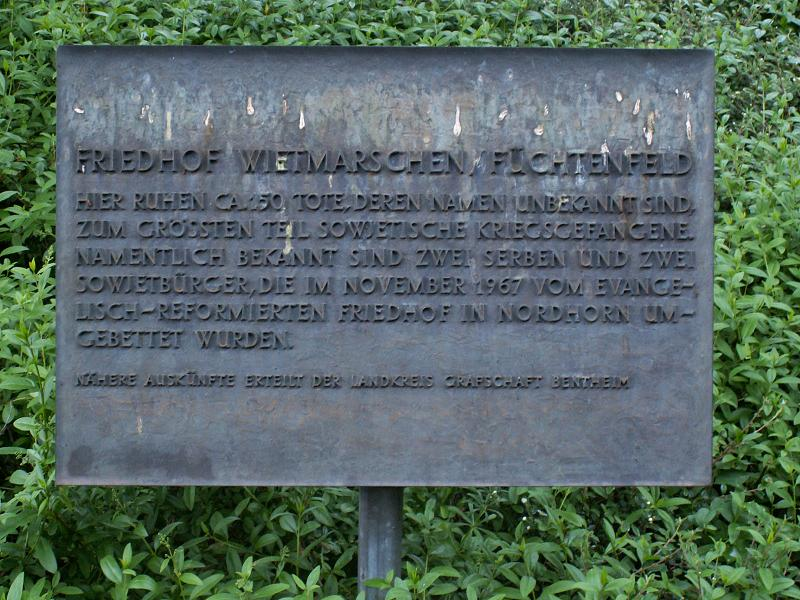 Kamp Wietmarschen